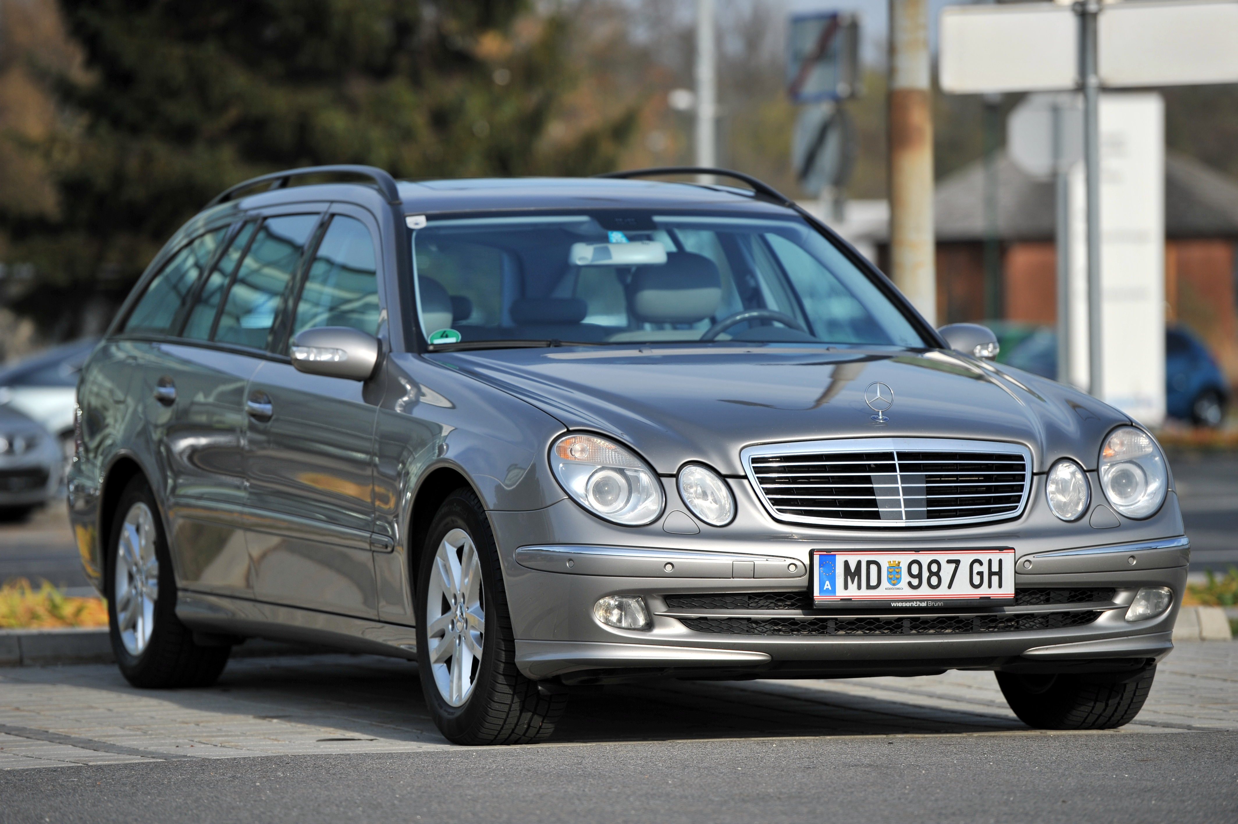 E320 CDI Bj 2005